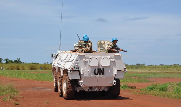 LEGENDE :Dungu, district du Haut-Uélé, Province Orientale, RD Congo: Des soldats de la paix du contingent marocain de la MONUSCO lors d’une patrouille aux abords de l’aéroport de Dungu. Photo MONUSCO/Force ======== CAPTION :Dungu, Upper Uele district, Oriental Province, DR Congo: Peacekeepers from the MONUSCO Moroccan contingent during a patrol in the area around the Dungu airport. Photo MONUSCO/Force